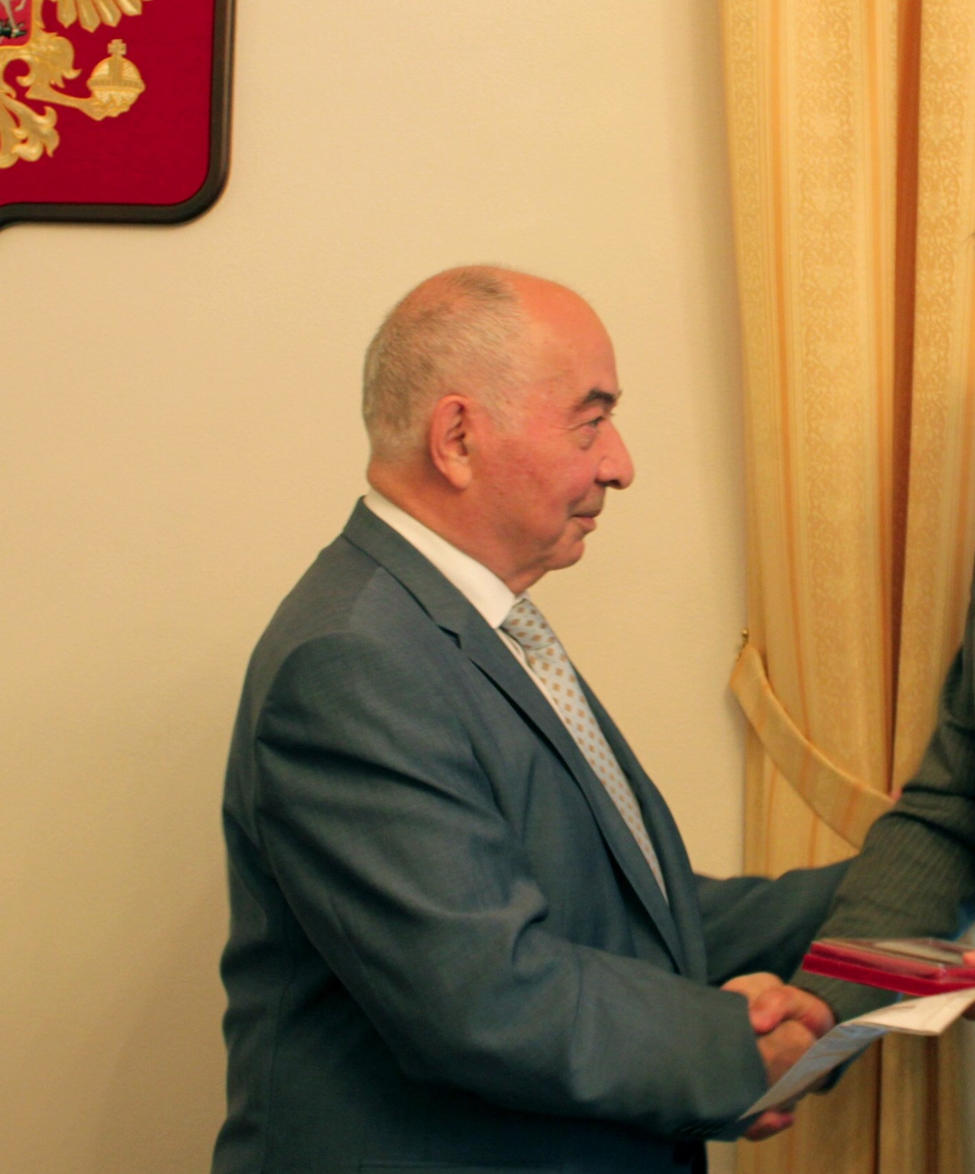 Доку Гапурович Завгаев во время поездки делегации Совета Федерации во главе с заместителем Председателя Совета Федерации Юрием Воробьевым в Республику Словению.